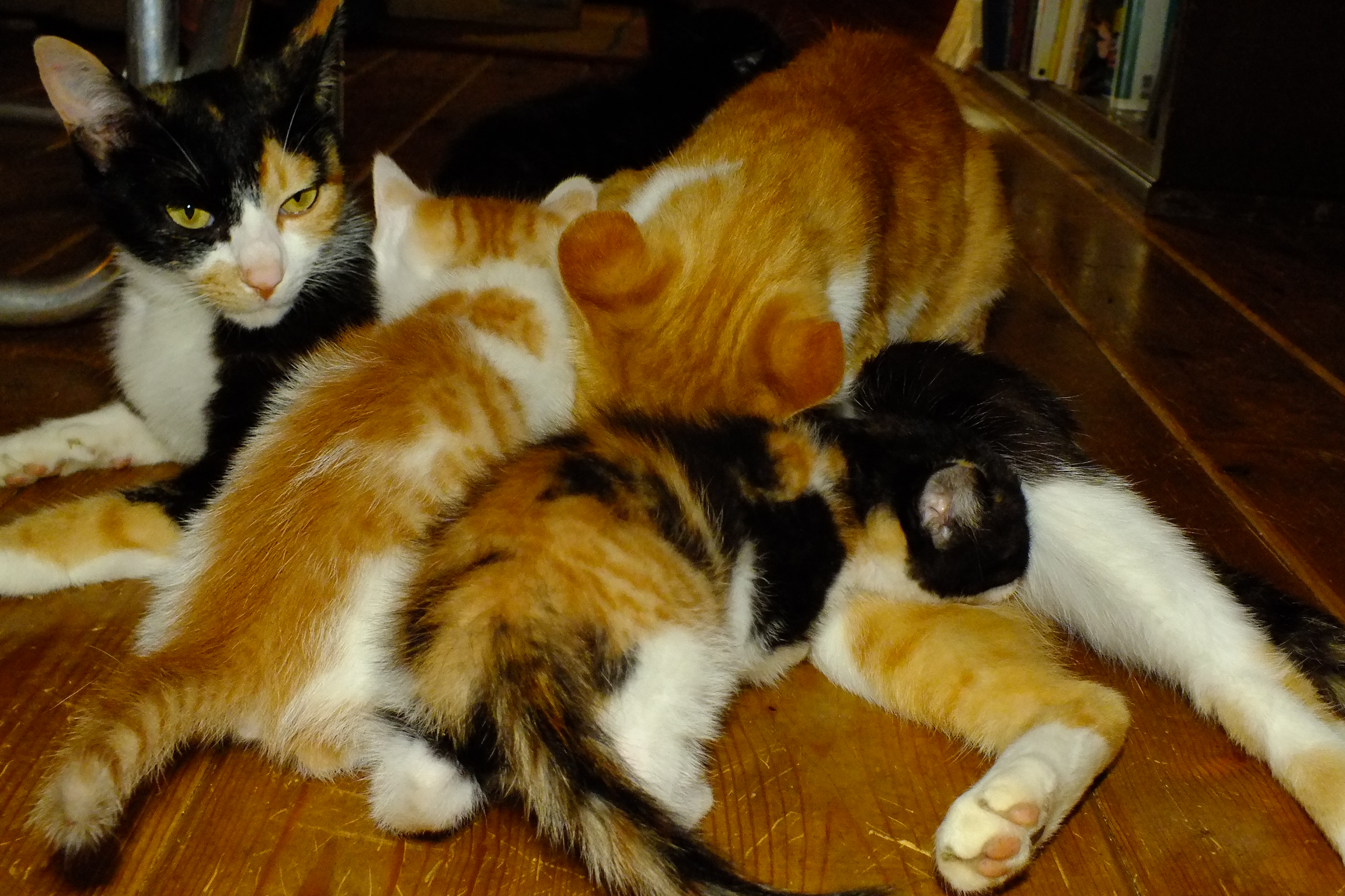 Ｂreast-feeding of Cats ネコの授乳